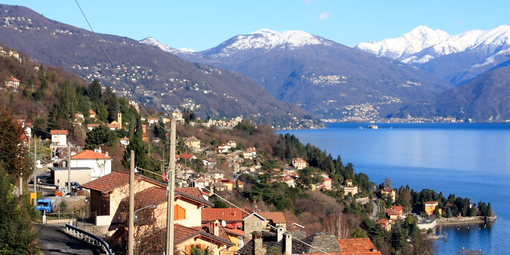 Panorama di Oggebbio